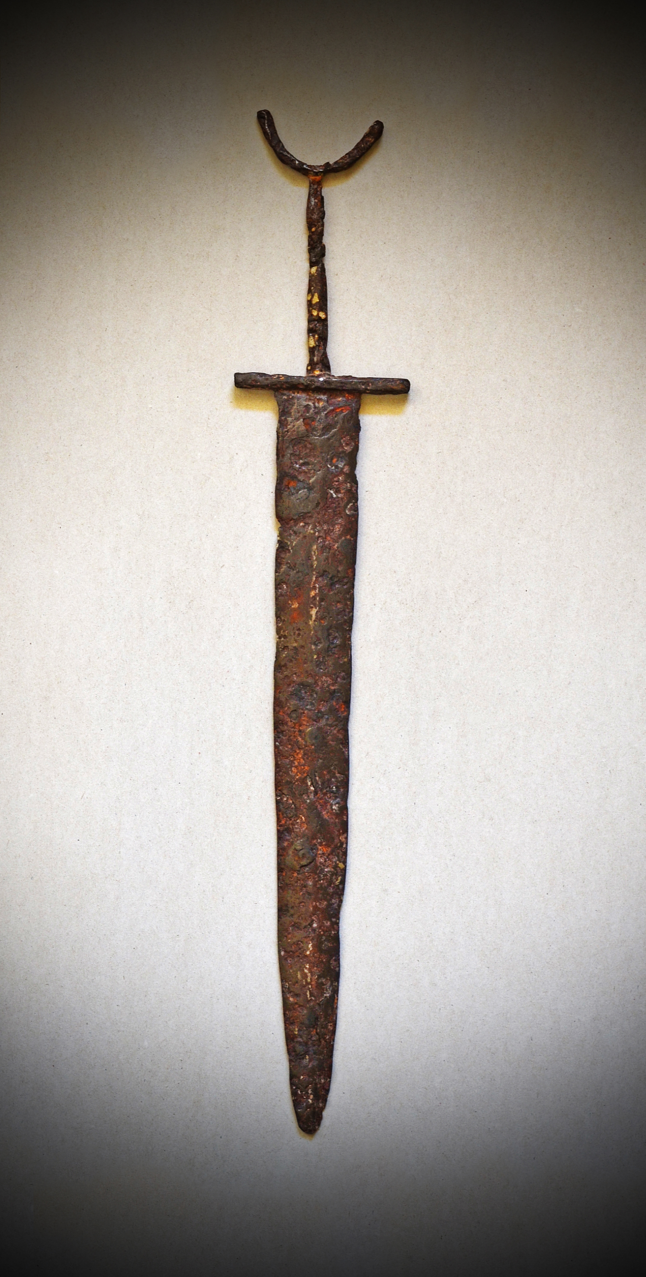 Сарматский меч.2-1 вв. до н.э.